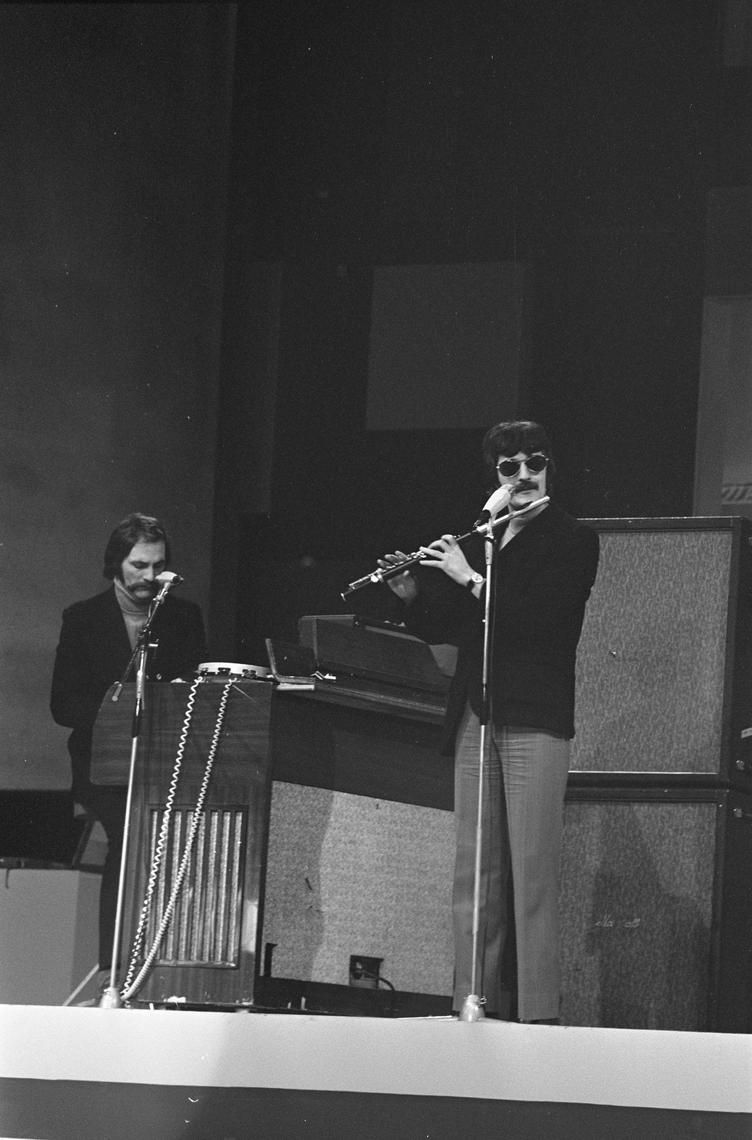 Collectie / Archief : Fotocollectie Anefo Reportage / Serie : Repetitie voor het Grand Gala du Disque in Congreshal van de RAI Beschrijving : muziek, repetities, televisie, muzikanten, Grand Gala Du Disque Annotatie : Datum : 6 maart 1969 Locatie : Amsterdam, Noord-Holland Trefwoorden : muziek, muzikanten, repetities, televisie Persoonsnaam : Grand Gala Du Disque Instellingsnaam : RAI Fotograaf : Fotograaf Onbekend / Anefo, [onbekend] Auteursrechthebbende : Nationaal Archief Materiaalsoort : Negatief (zwart/wit) Nummer archiefinventaris : bekijk toegang 2.24.01.05 Bestanddeelnummer : 922-1751 Reacties Geplaatst door Muziekliefhebber op 17 januari 2018 - 23:02. Twee leden van de Britse band The Moody Blues, Mike Pinder (mellotron - piano) Ray Thomas (fluit) Zie ook